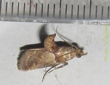 Hypotia saramitoi Guillermet, 1996